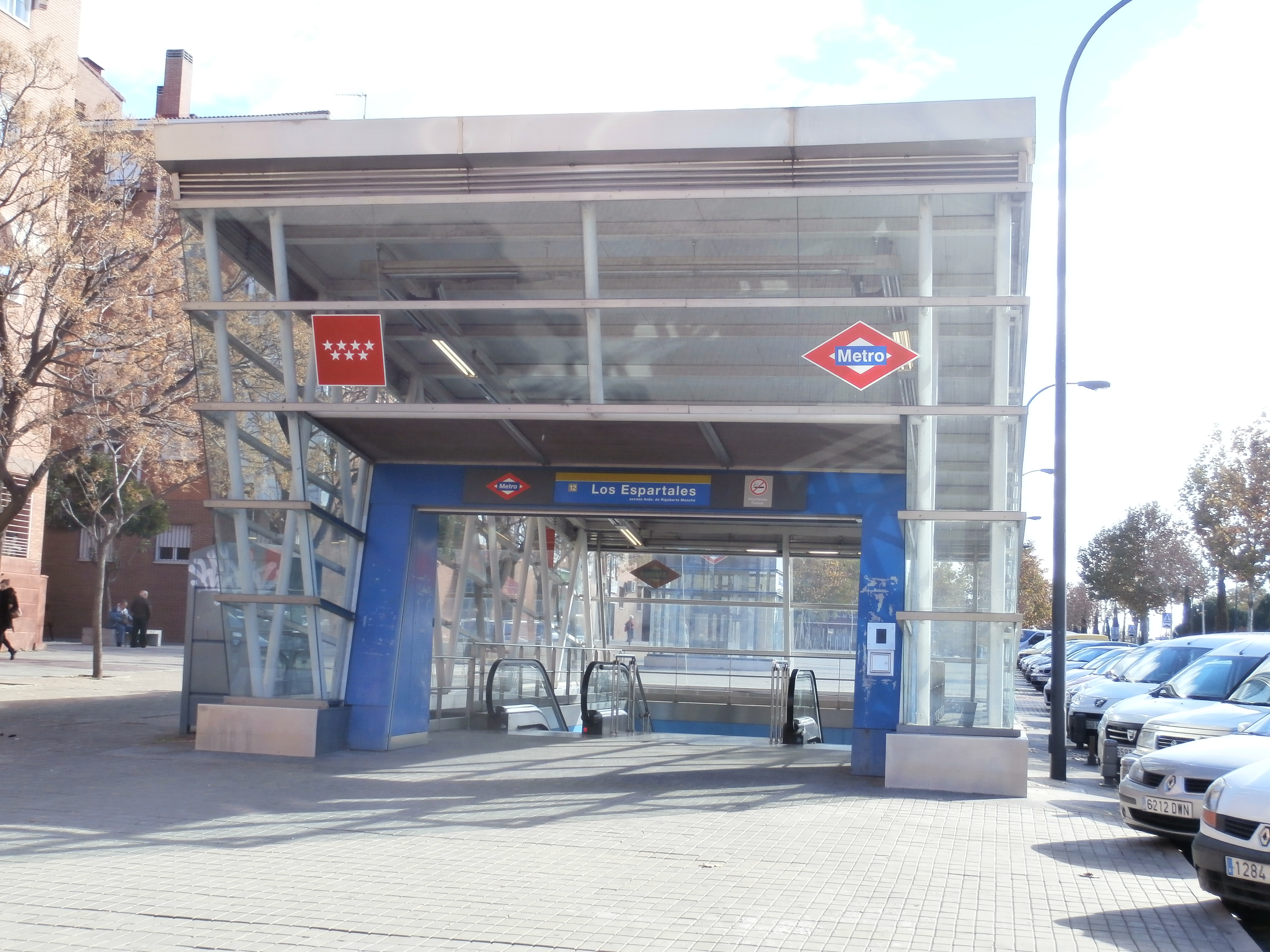 Boca de acceso de la estación de Los Espartales en Getafe.